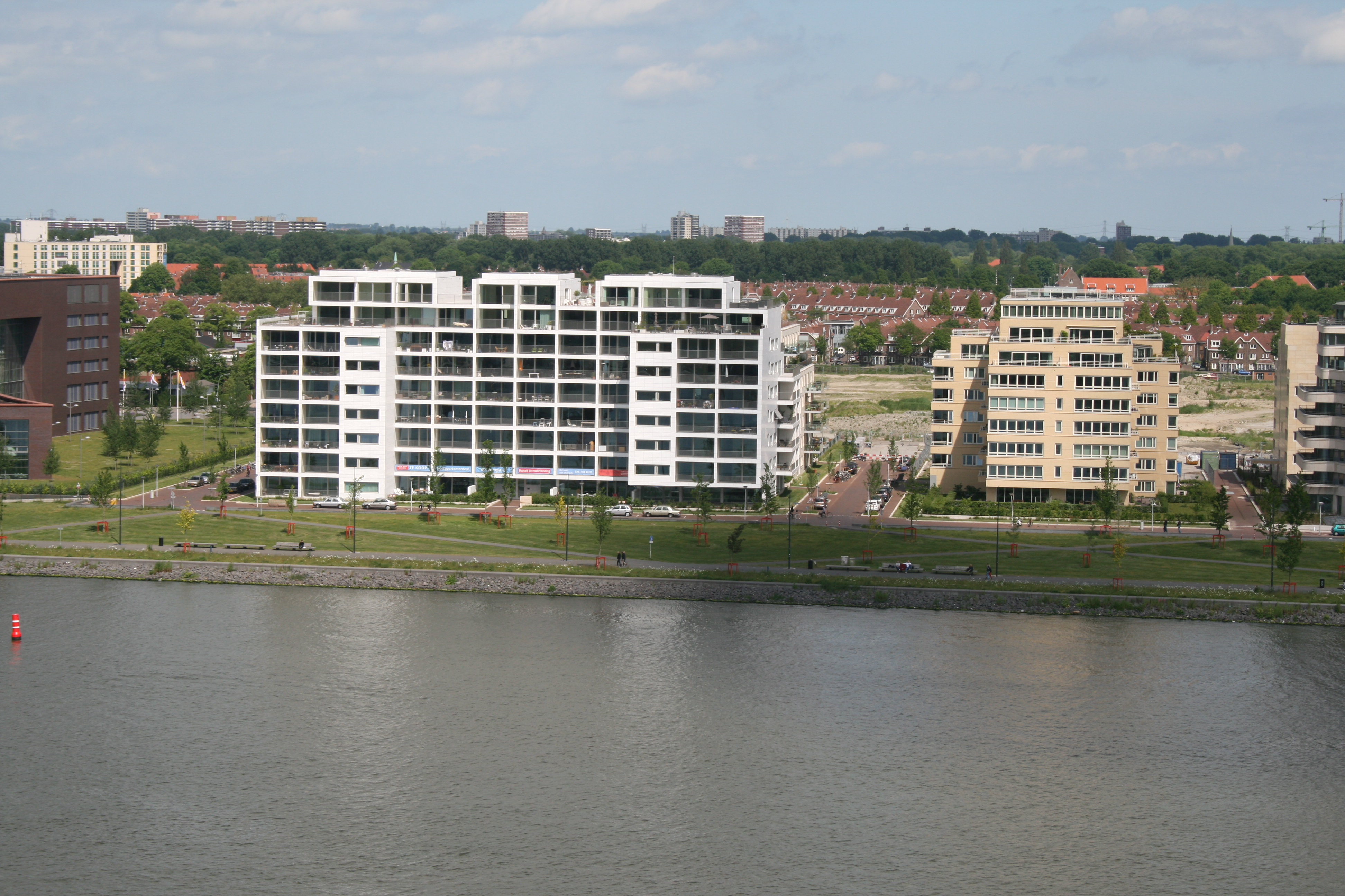 Overhoeks, Amsterdam-Noord: woongebouwen Europa en Oranje, gezien vanaf gebouw IJdock, 2 juni 2012.